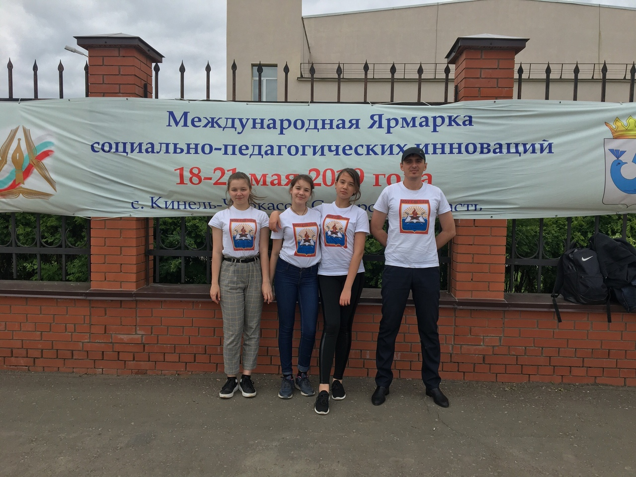 Кадеты полицейского класса им. Д.А. Маковкина - победители Международной Ярмарки социально-педагогических инноваций в Самарской области, май 2019 год.